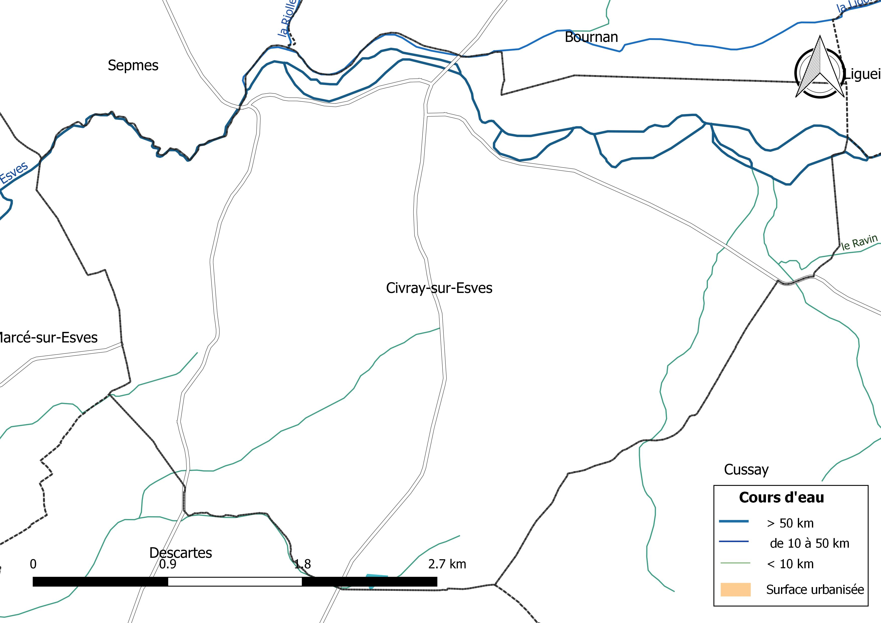 Carte du réseau hydrographique de la commune de Civray-sur-Esves (France).